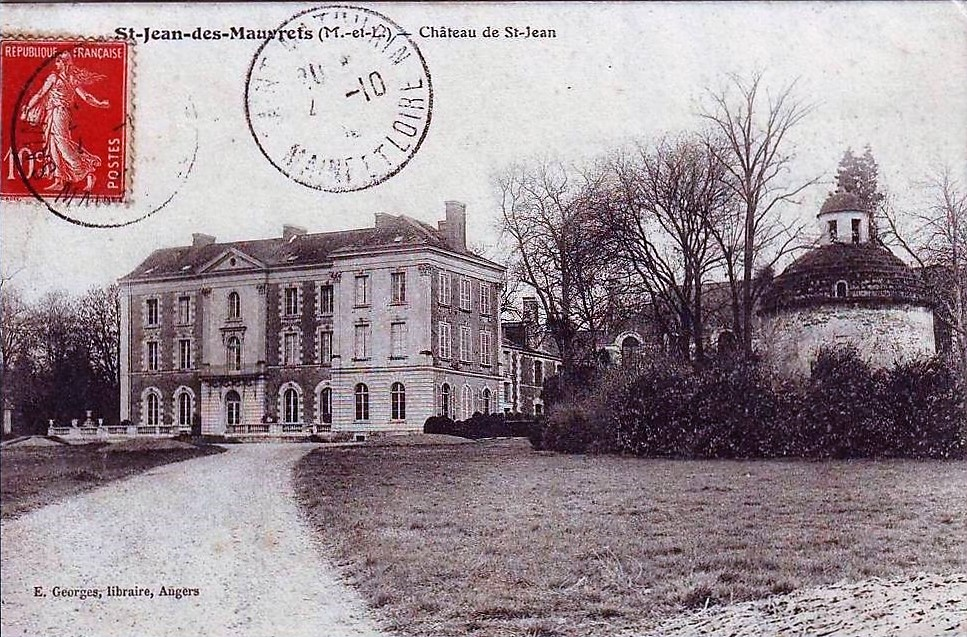 Carte postale, Saint-Jean-des-Mauvrets (Maine-et-Loire, France) - Château de Saint-Jean.